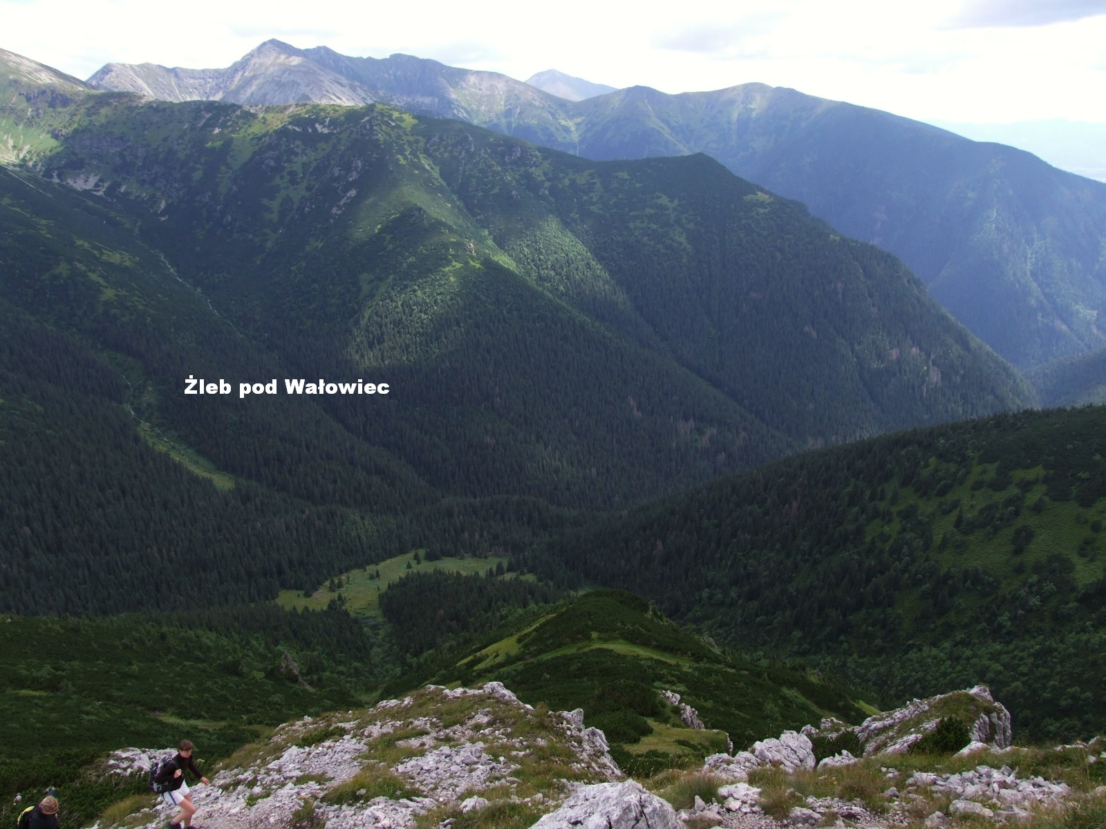 Wielki Łysiec, Mały Łysiec, Żleb pod Wałowiec i Dolina Jalowiecka. Widok z Siwego Wierchu